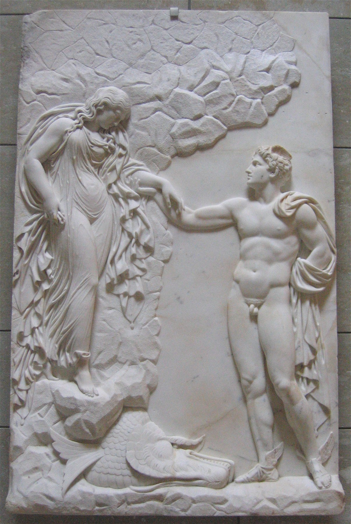 Julius Troschel: Perseus und Andromeda, um 1840/50, Neue Pinakothek in München